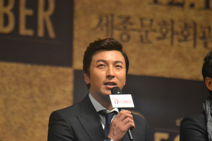 131031 音樂劇December試演會朴建炯發言